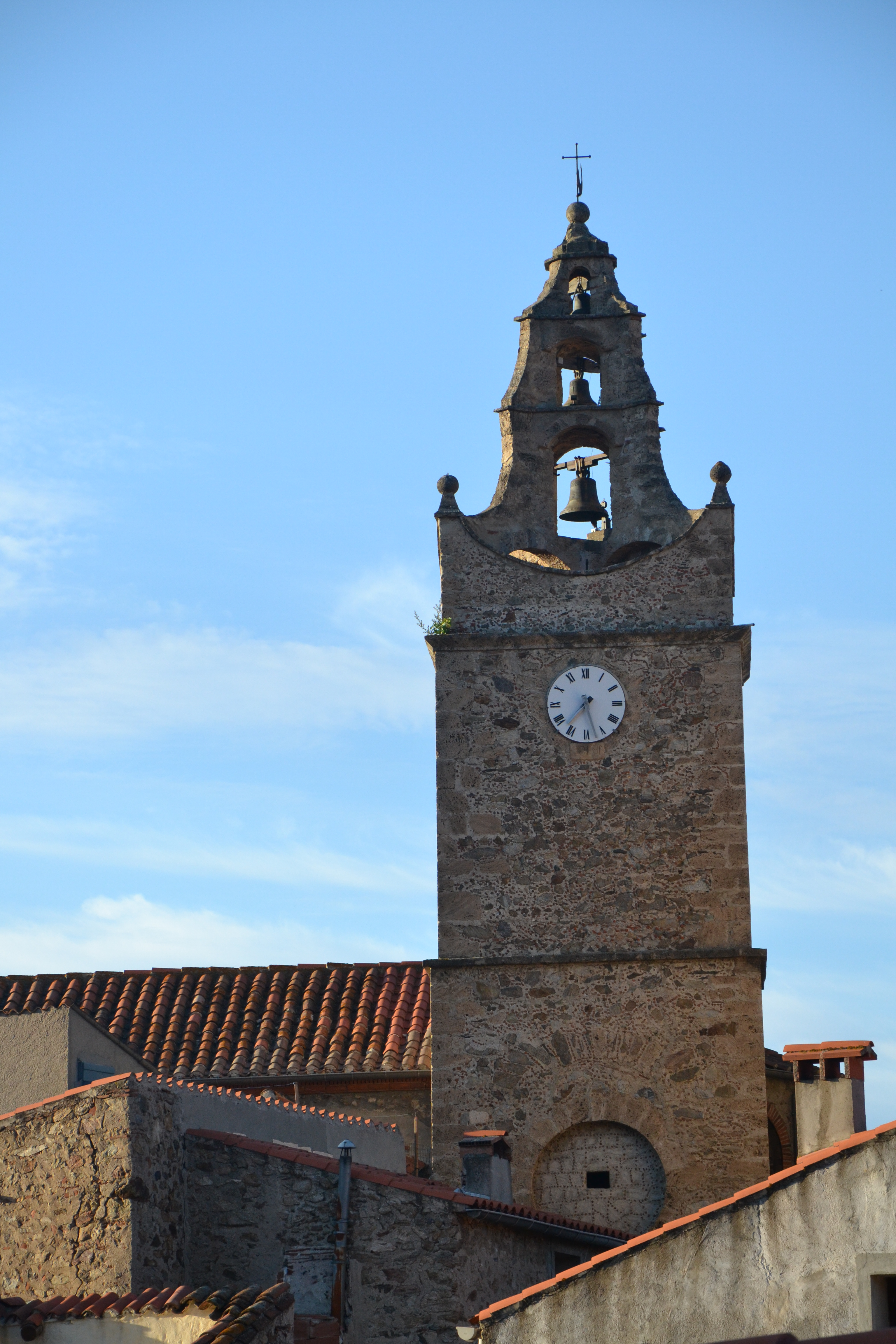 Église Saint-Étienne de Caramany (Pyrénées-Orientales, France)